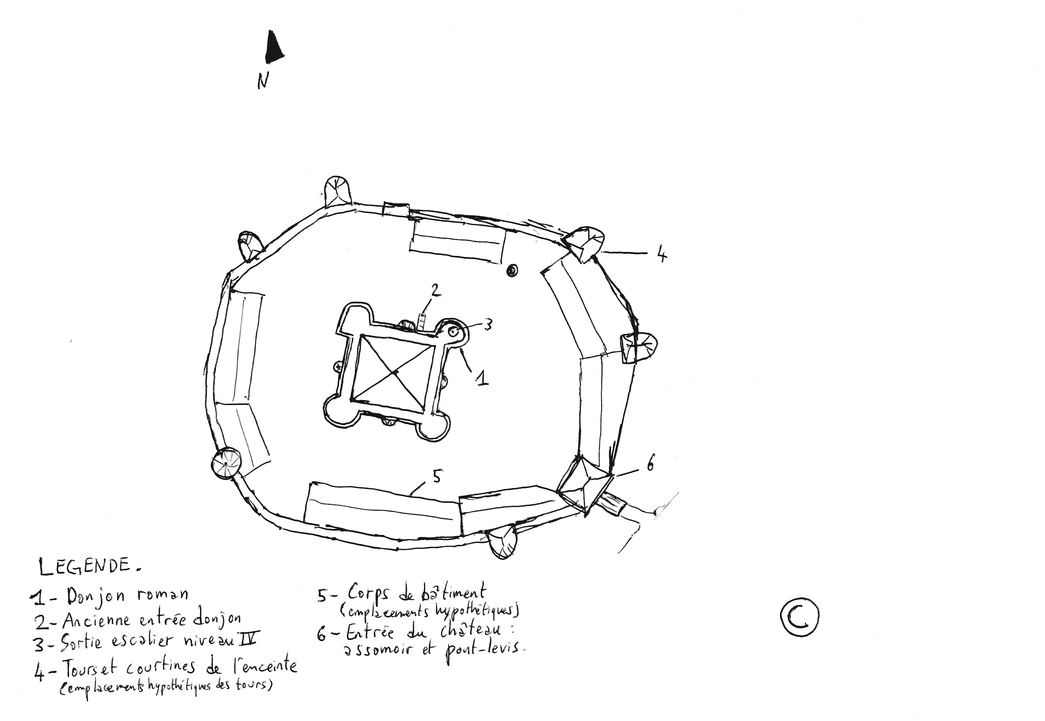 Plan du château fort tel qu'il devait être au XIVe siècle.